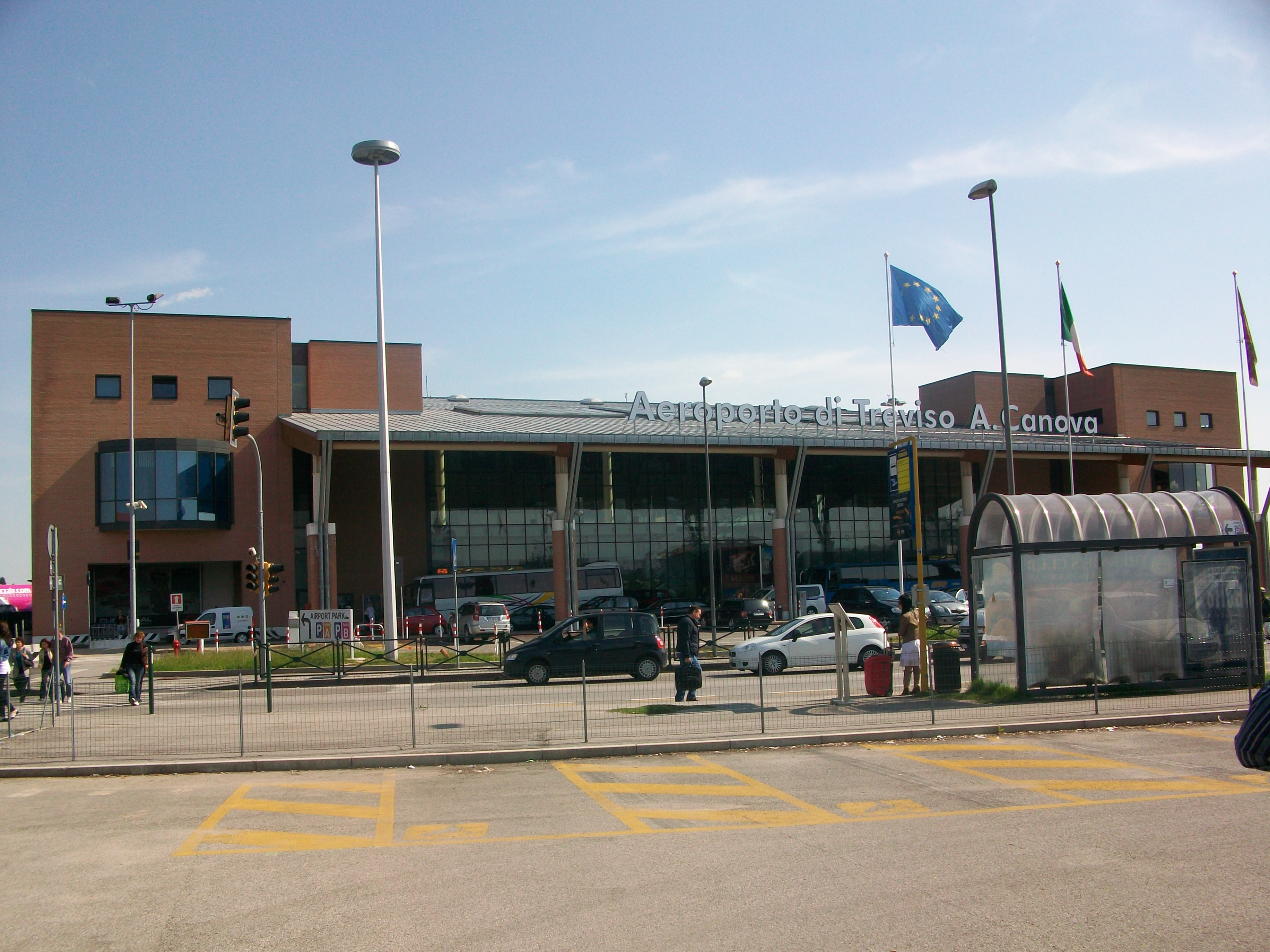 Terminal aeroportuale